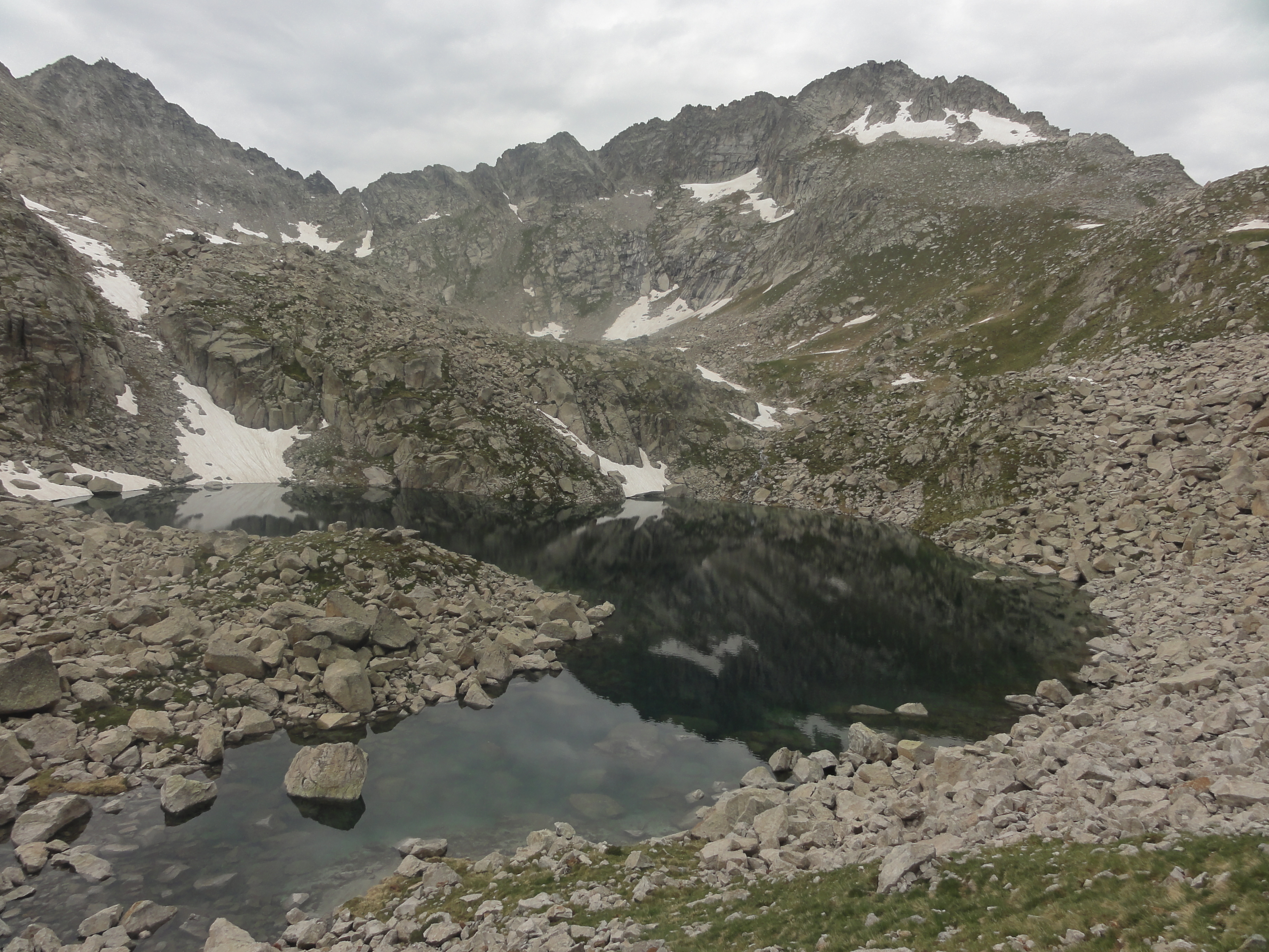 Aigüestortes This is a a photo of a natural area in Catalonia, Spain, with id: ES510081